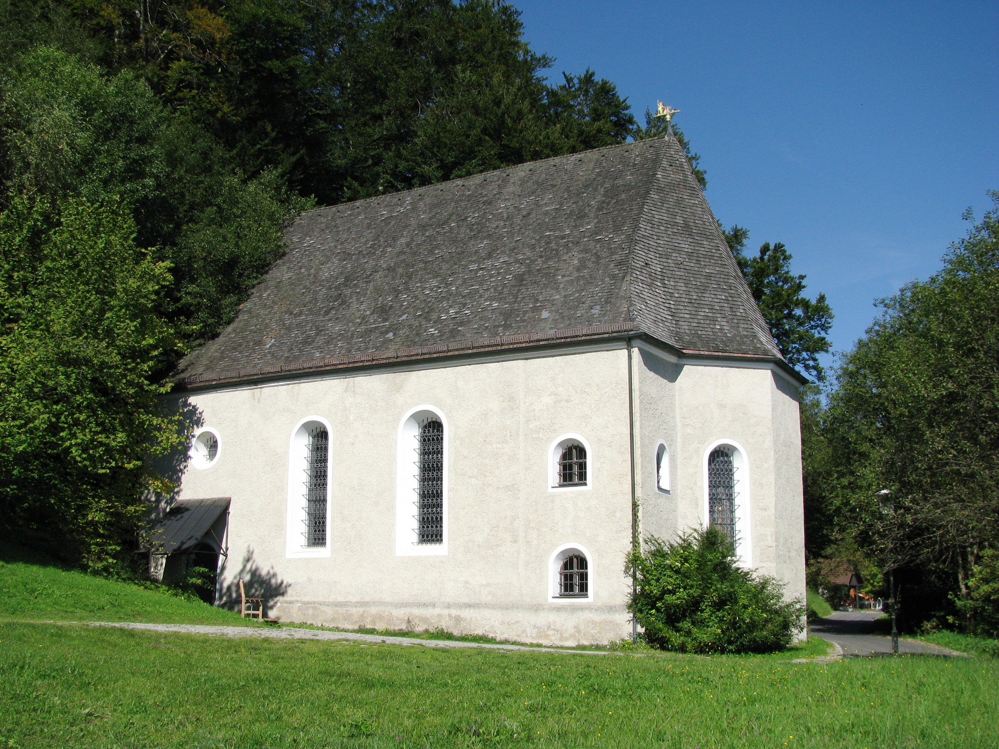 Wallfahrtskirche St. Sebald in Egling, Oberbayern